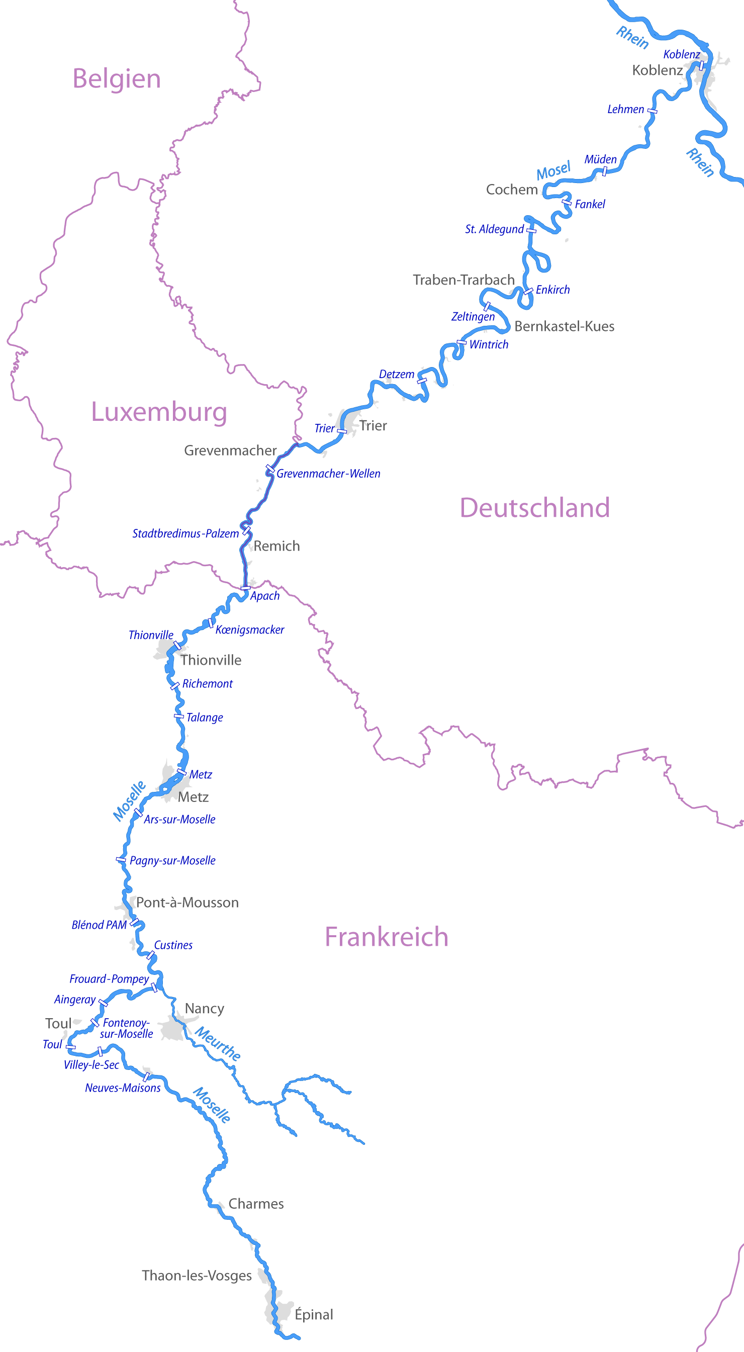 Karte der Moselstaustufen